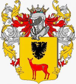 Stemma Famiglia Corviglio